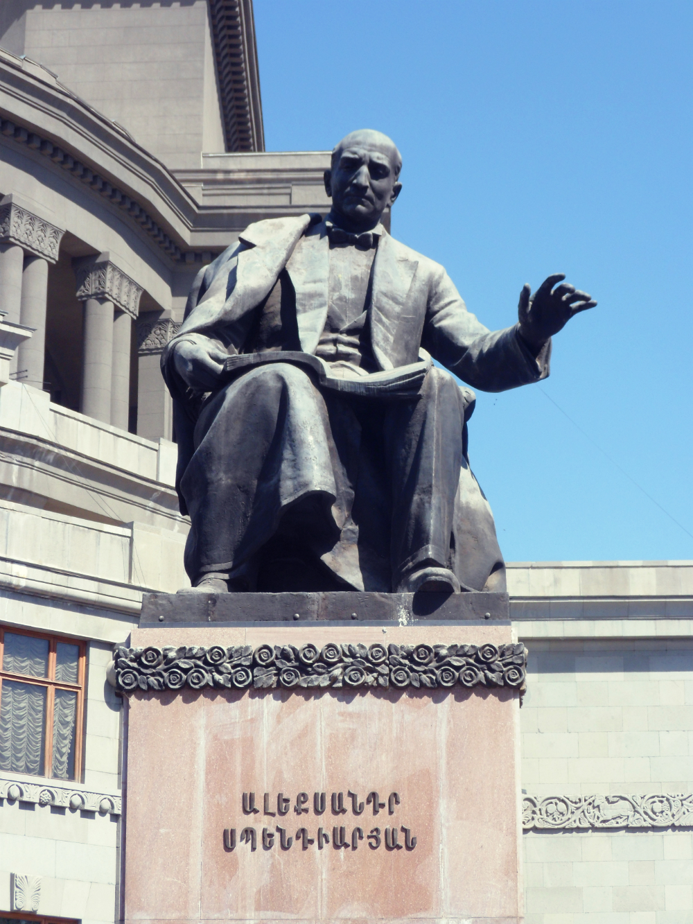 Ալեքսանդր Սպենդիարյանի հուշարձանը Ազատության հրապարակում 6/95.5